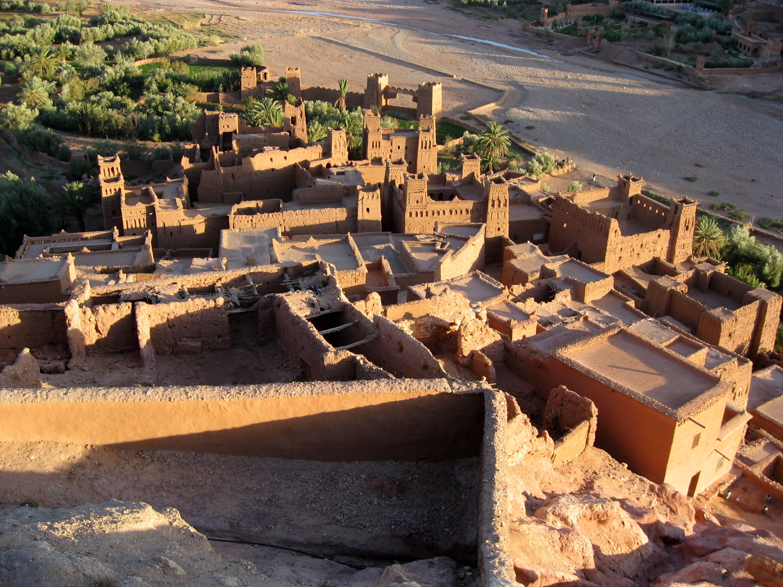 Aït Benhaddou